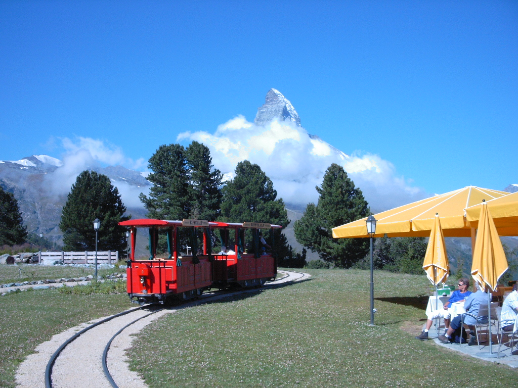 Riffelalptram bei Zermatt, 2222m ü.M., Juli 2003. Riffelalptram near Zermatt, 2222m ü.M., July 2003.